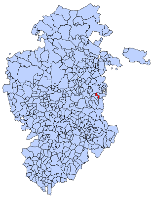 San Vicente del Valle en Burgos